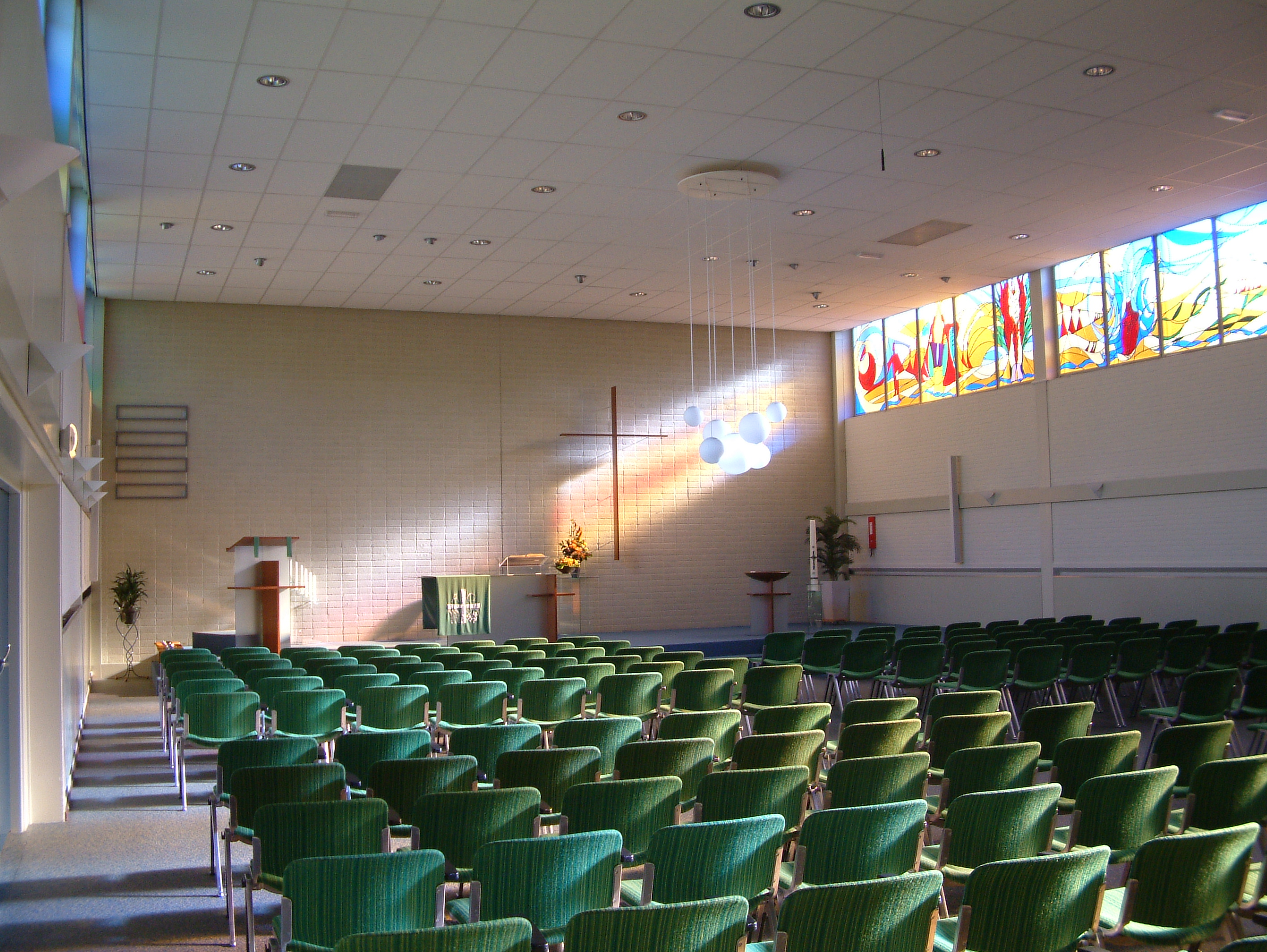 Het Kerkelijk centrum De Oase in de wijk Meerzicht in Zoetermeer